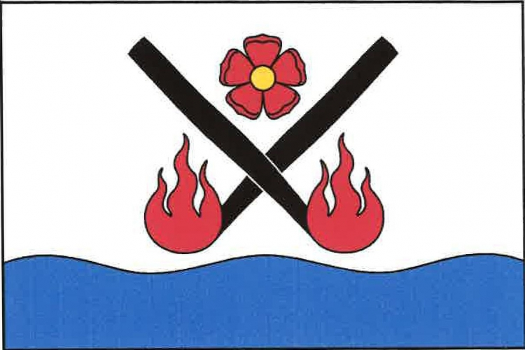 vlajka, Loučovice , okres Český Krumlov